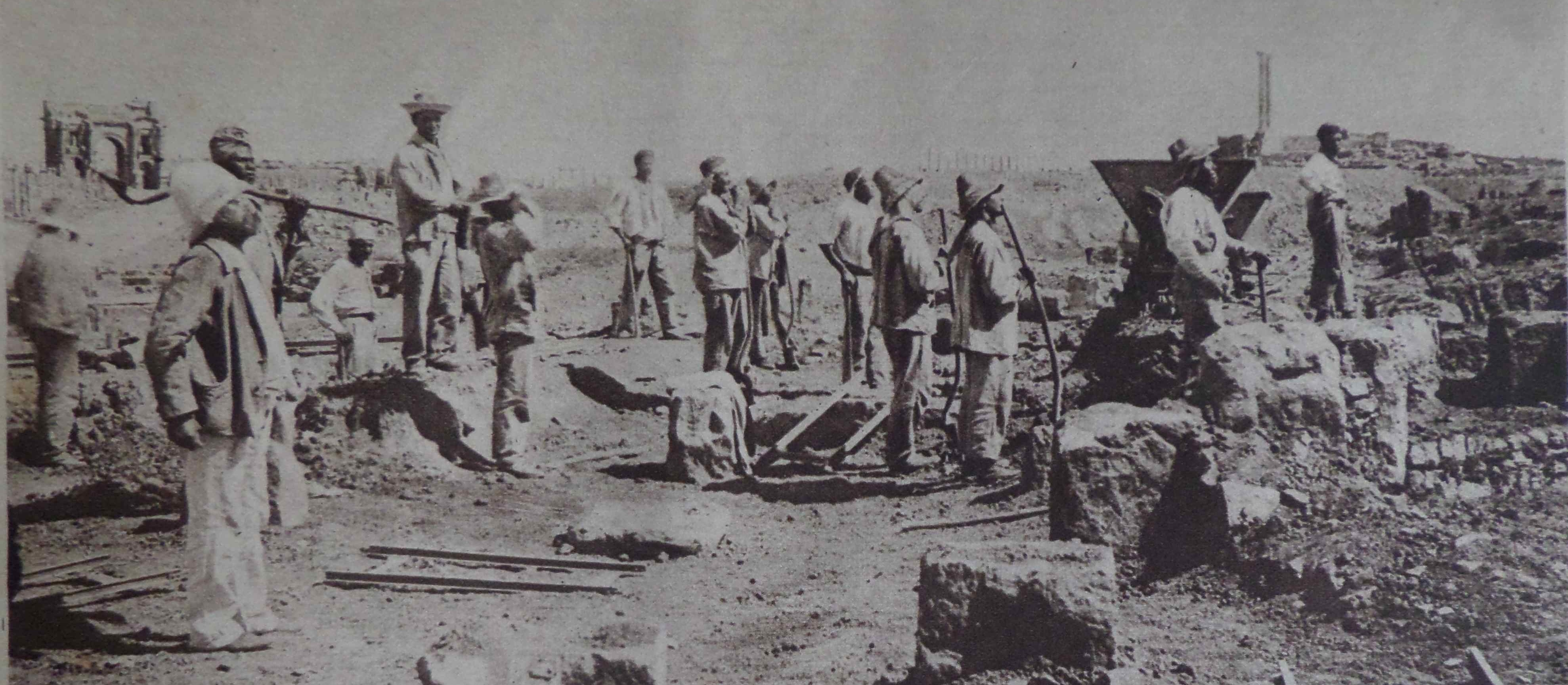 « Les pénitenciers militaires aux fouilles de Timgad », in dossier sur « Les Bagnes militaires ».